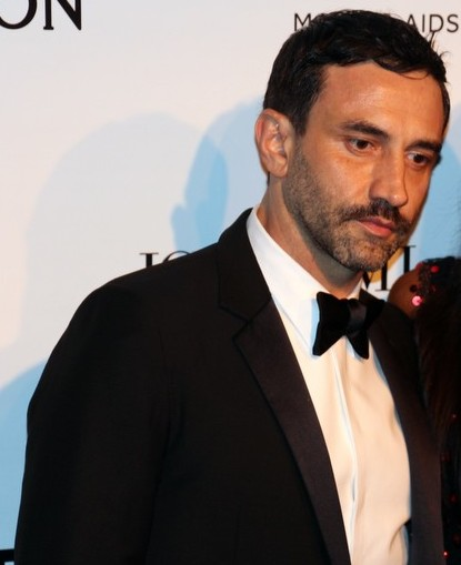 11 - Ricardo Tisci e Naomi Campbell